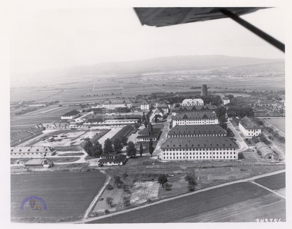 Wartturm-Kaserne in Friedberg/Hessen (Ray-Barracks)